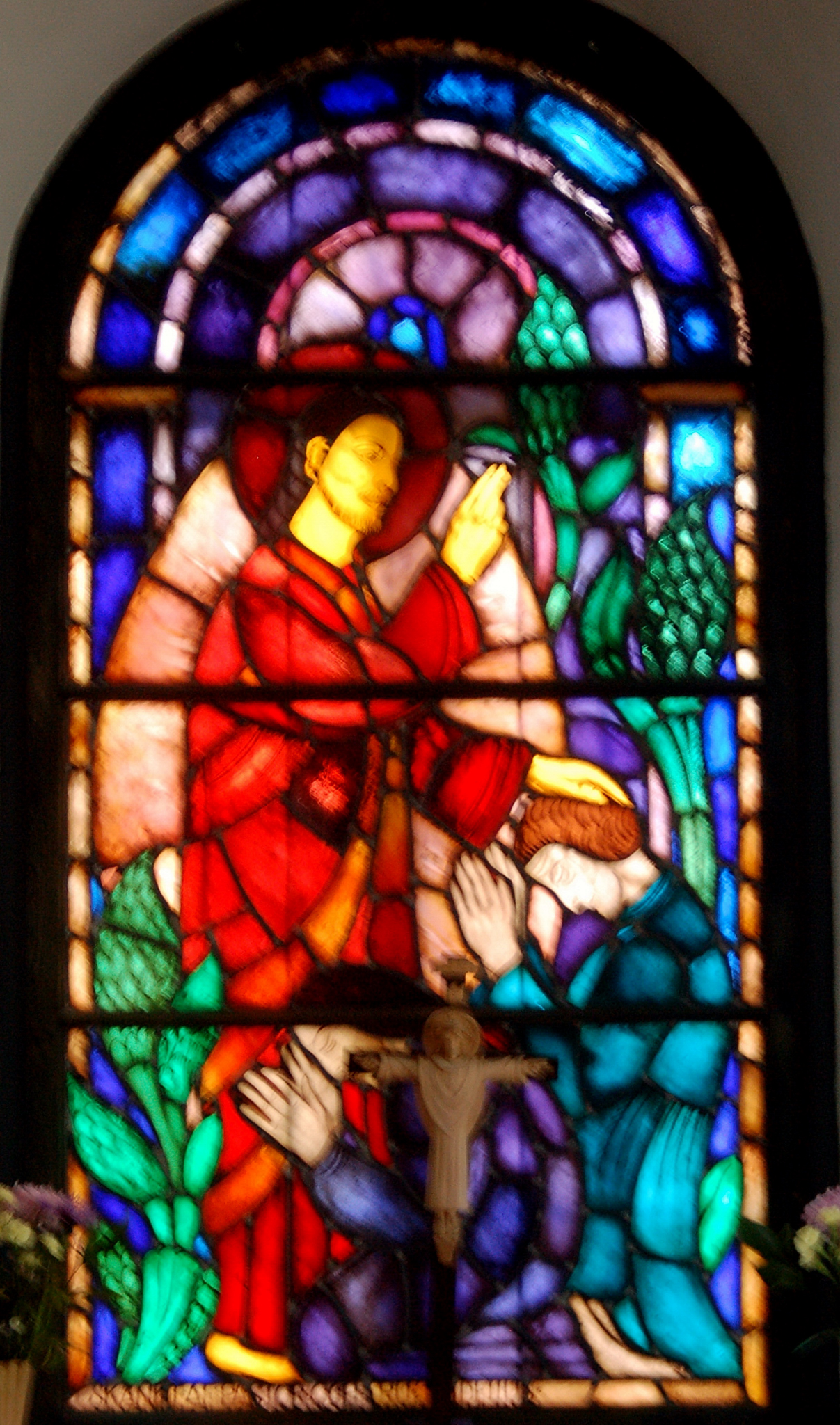 Altartavlan Tived kyrka, Tived, Laxå Sweden.